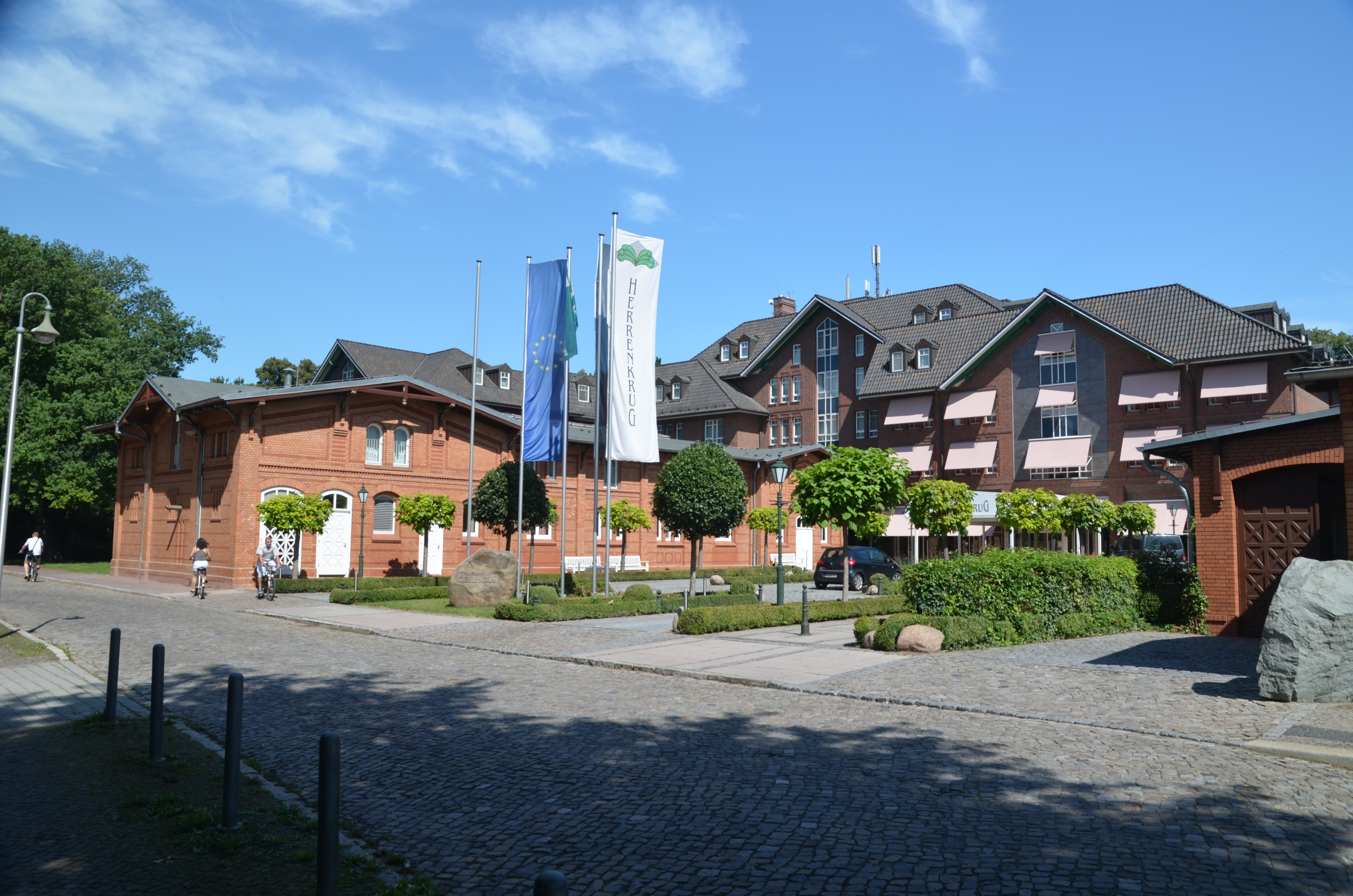 Herrenkrug Parkhotel Magdeburg